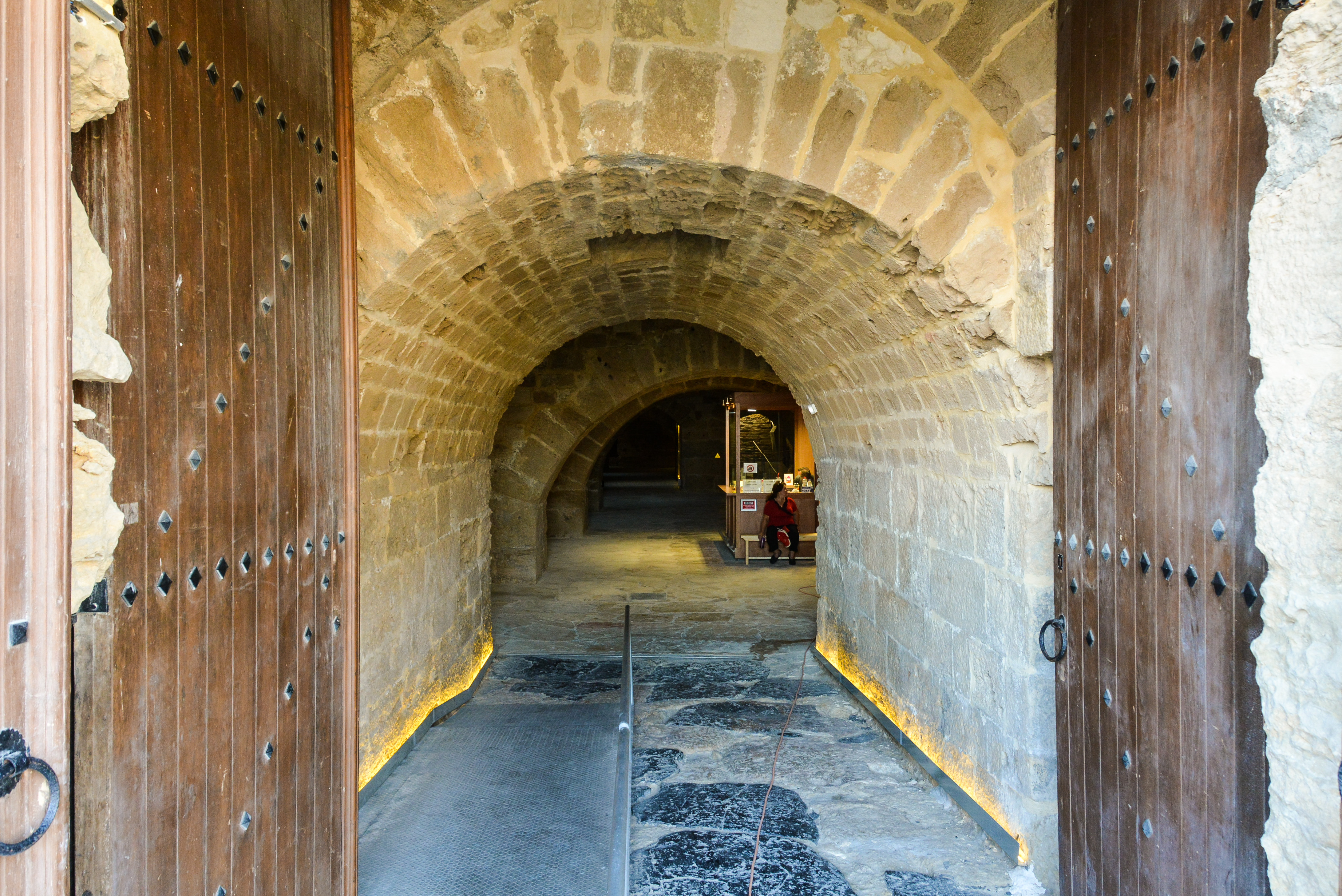 Θαλάσσιο Φρούριο ενετικού λιμένος Ηρακλείου (Κούλες)«Κούλες»